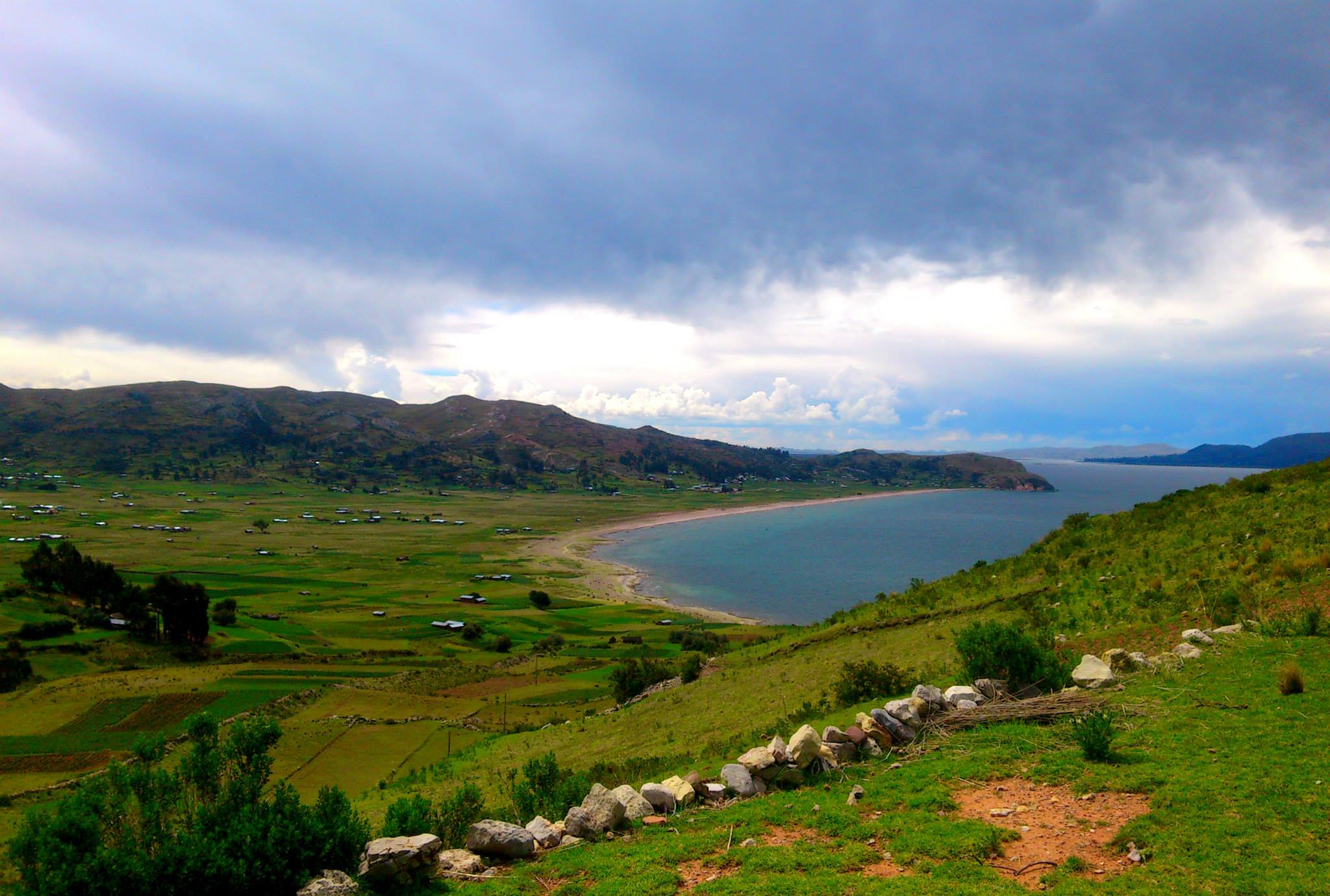 Platería Puno Peru